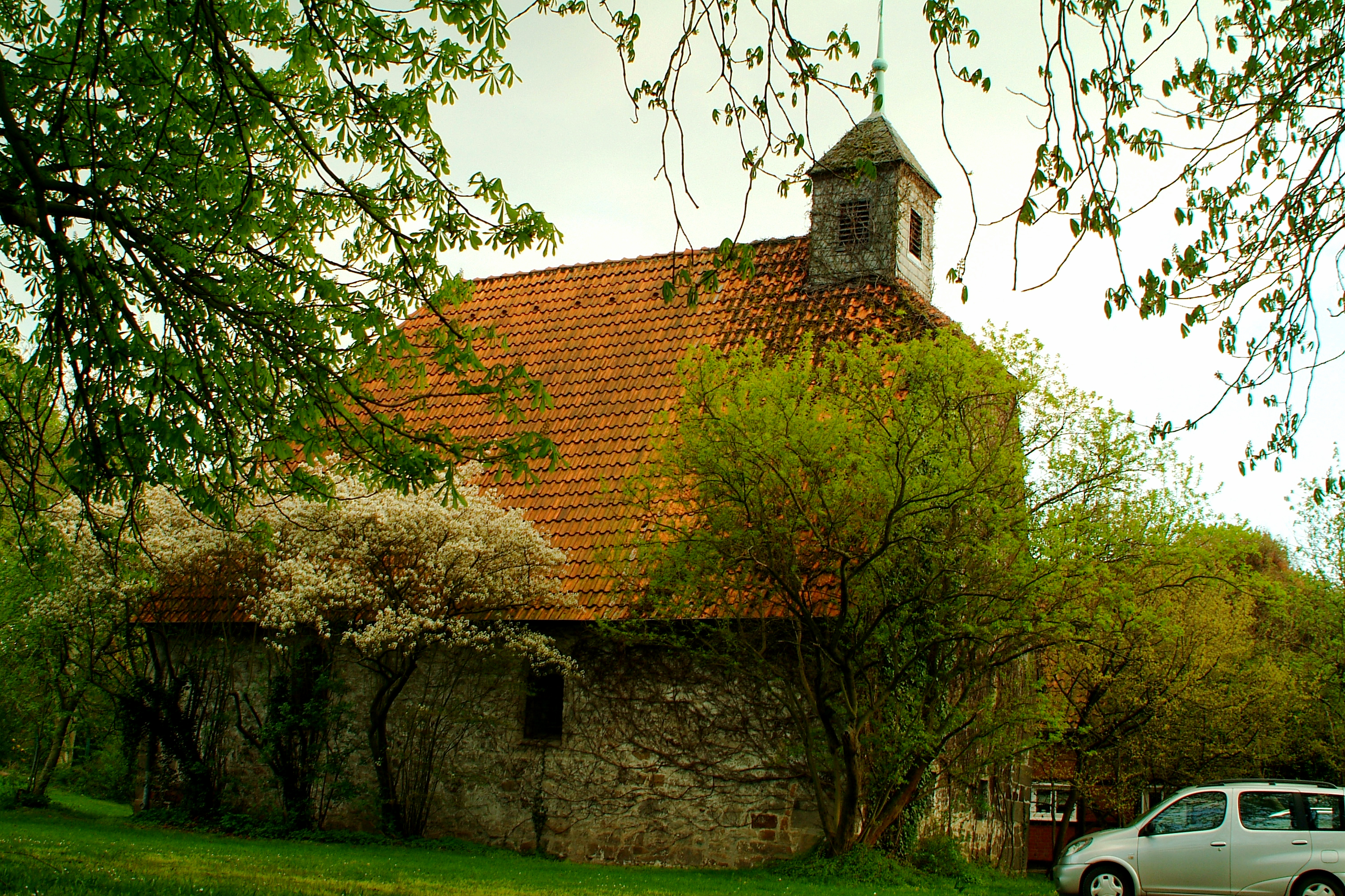 Marienkapelle der Familie von Alten in Ricklingen, Hannover